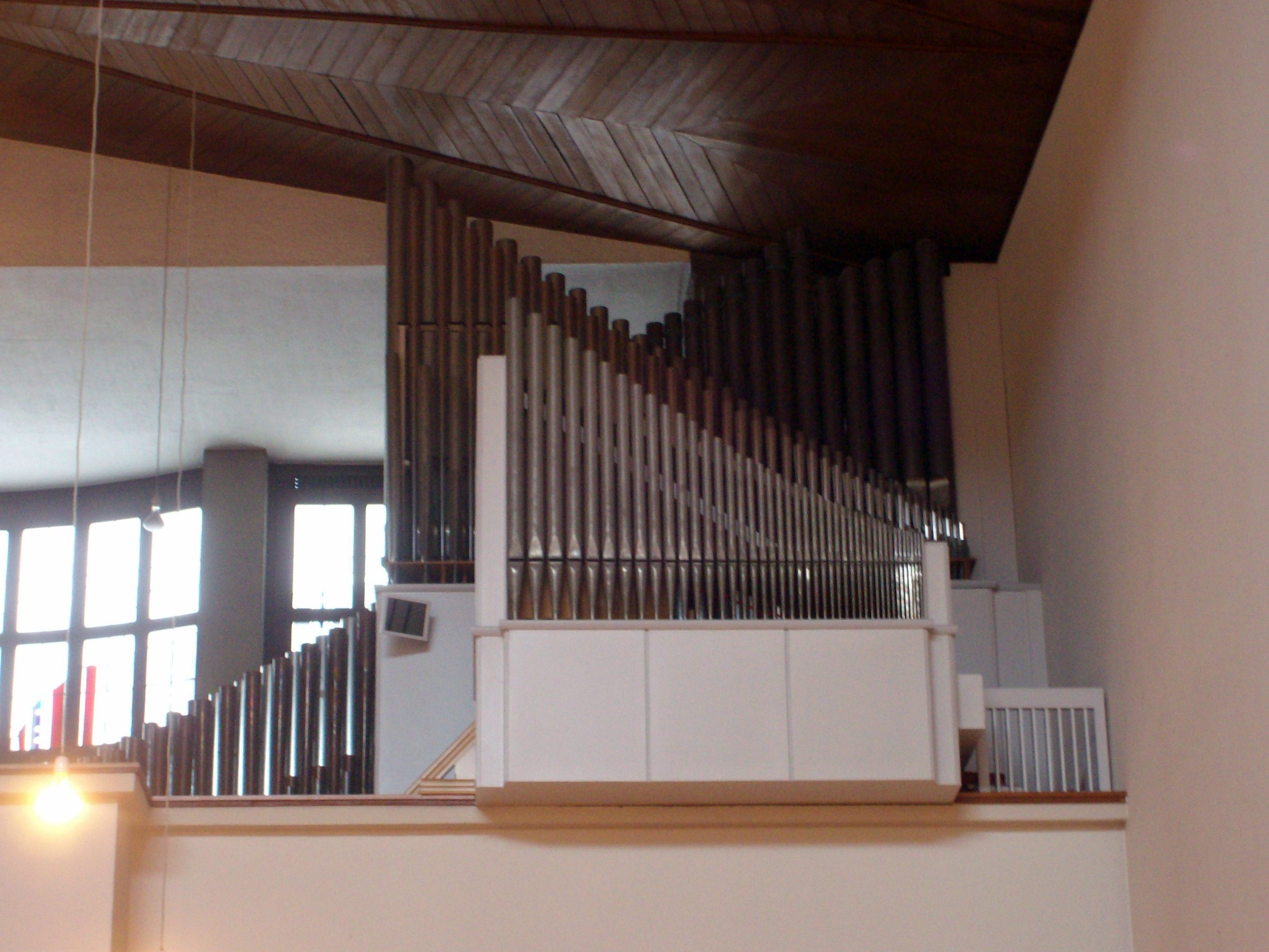 Orgel in St. Albertus, Gießen, Hessen